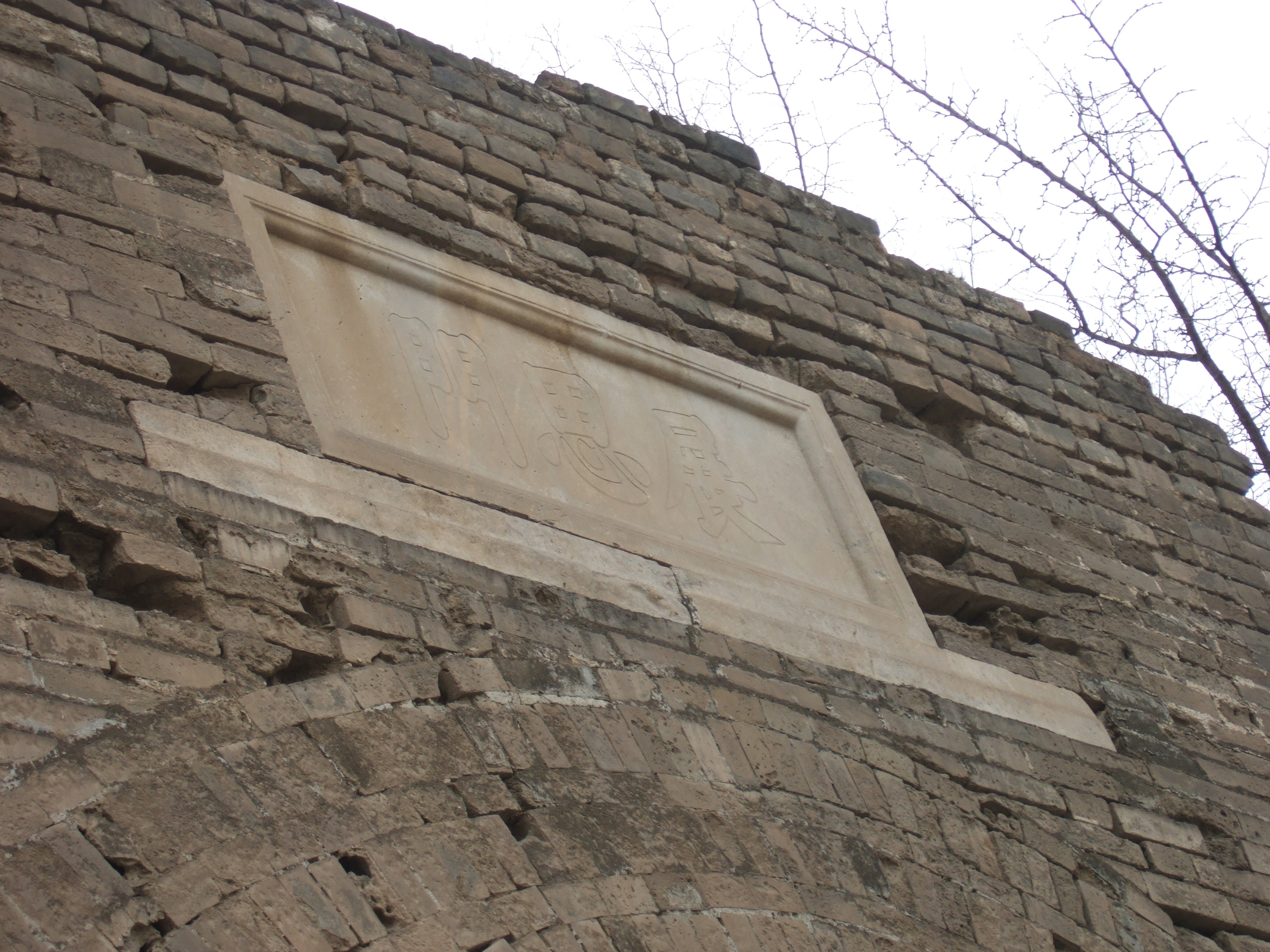 中文（中国大陆）: 巩华城的北门叫做展思门